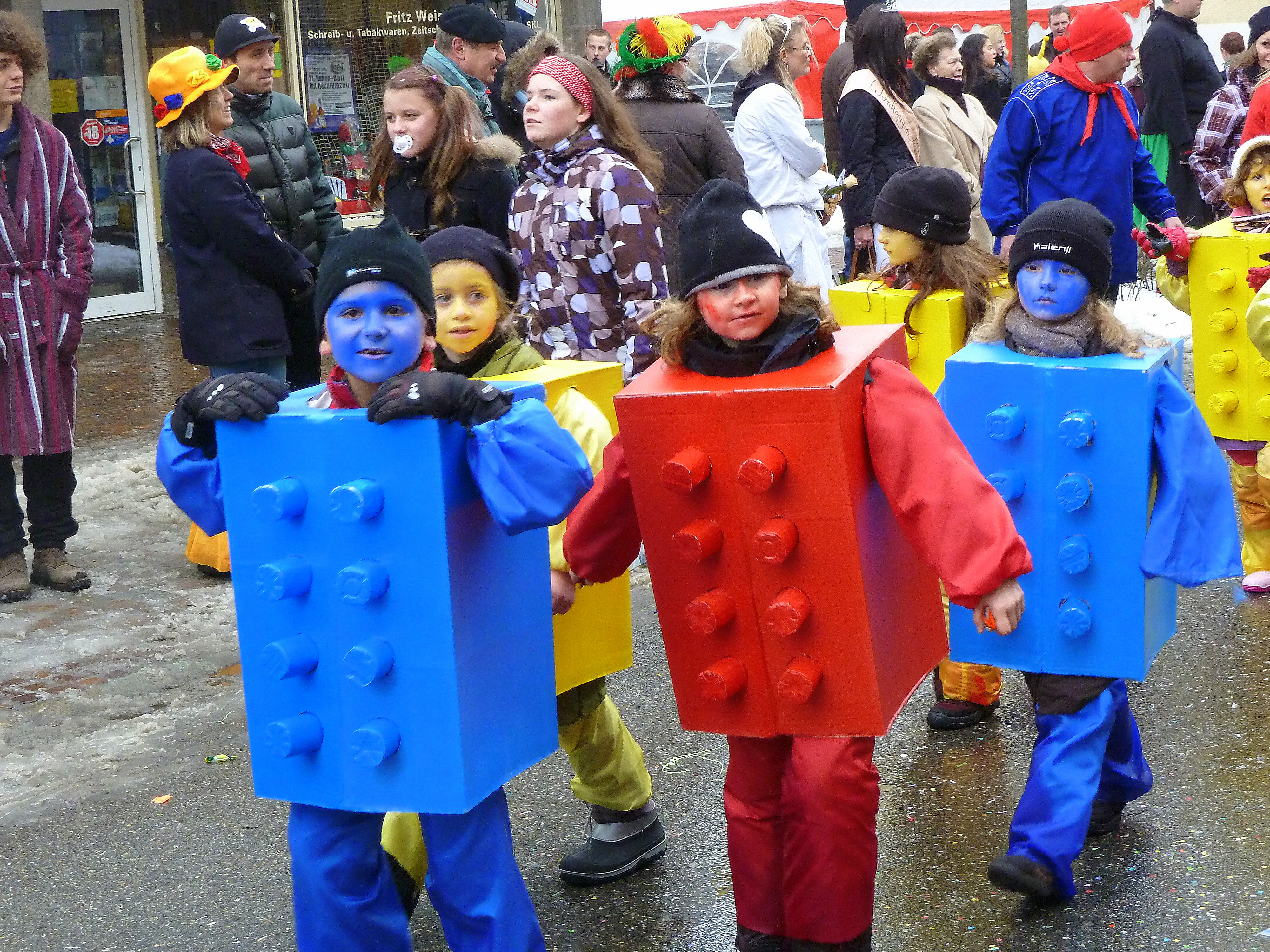 Kinderumzug Donaueschingen 2012, LEGO-Kostüme